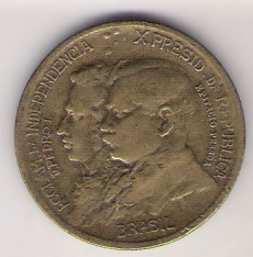 Verso de uma moeda de 1000 Réis cunhada em 1922. This graphic was created with GIMP.